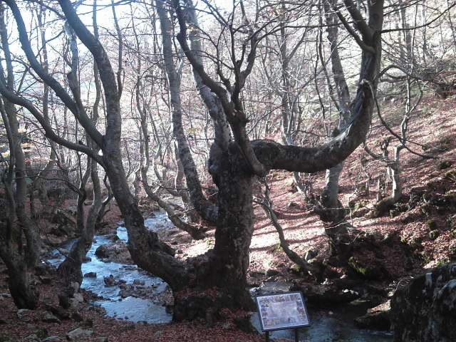 Haya de Ciñera. Situada en El Faedo (Ciñera de Gordón, León, España). Fotografiada en invierno.